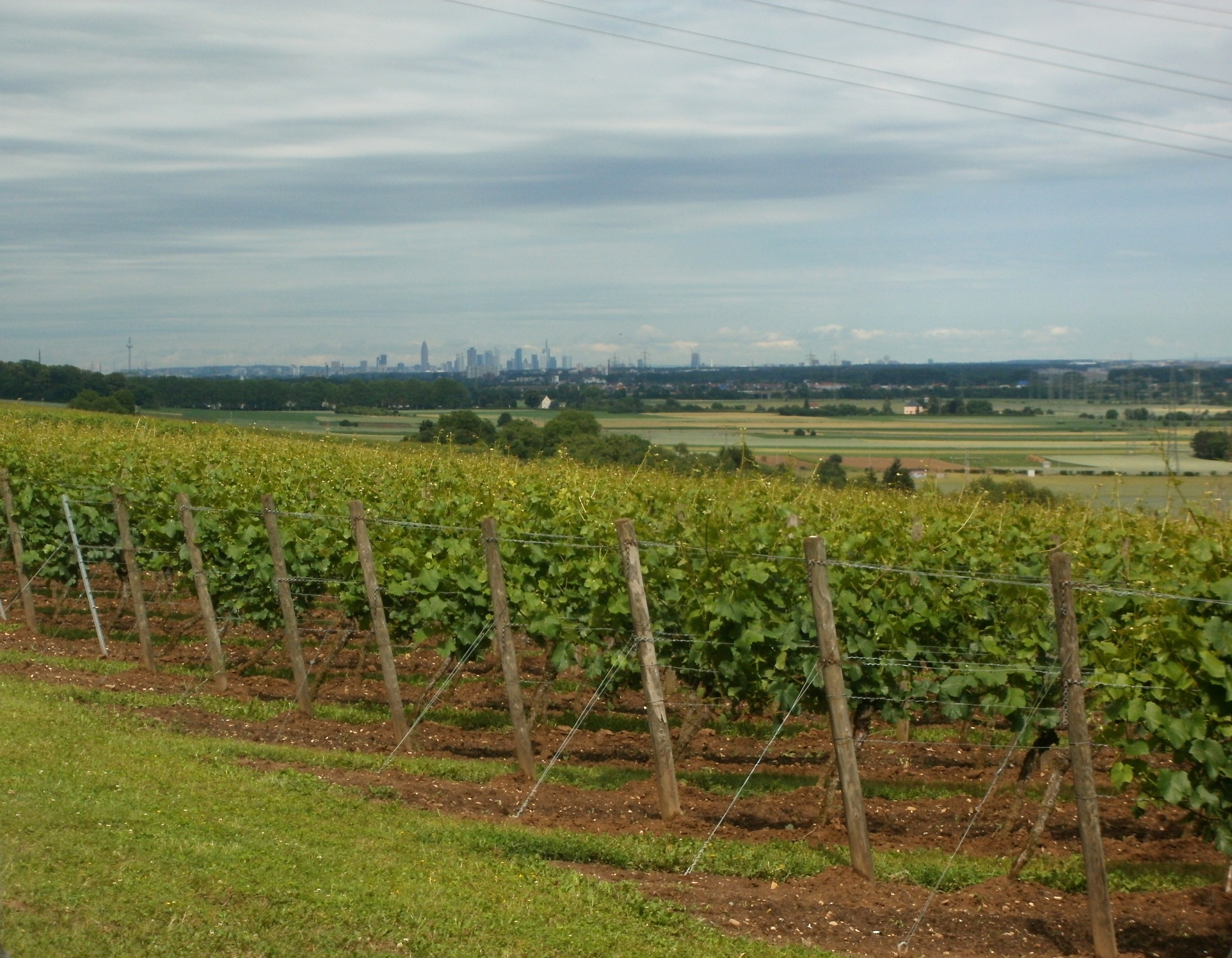 Weinberge bei der Flörsheimer Warte, im Hintergrund die Skyline von Frankfurt